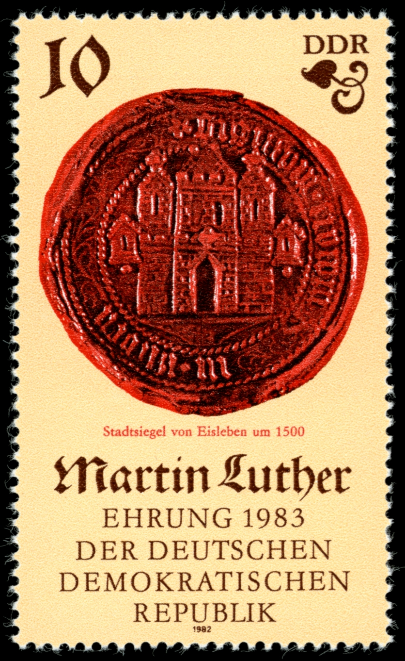 Briefmarke der DDR. 500. Geburtstag von Martin Luther (I): Stadtsiegel von Eisleben (um 1500).